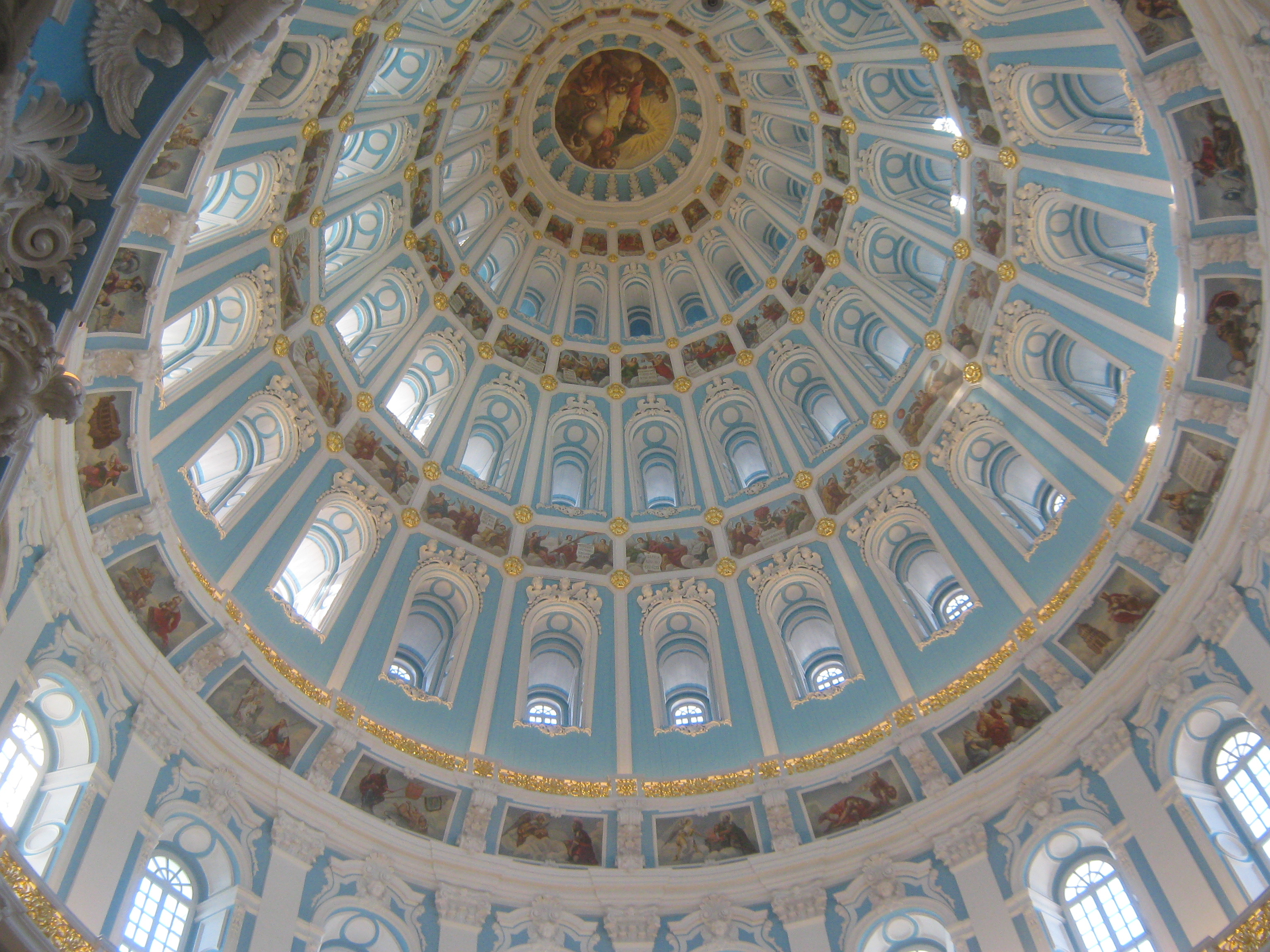 Воскресенский собор в Истре - купол